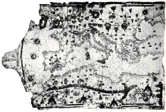 Die Weltkarte des Ibn Ben Zara aus dem Jahr 1487 mit großen Überschwemmungsflächen in England, Schottland und im Oberrheintal